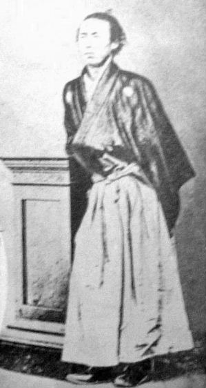 a Japanese man 坂本龍馬 (Ryoma Sakamoto)